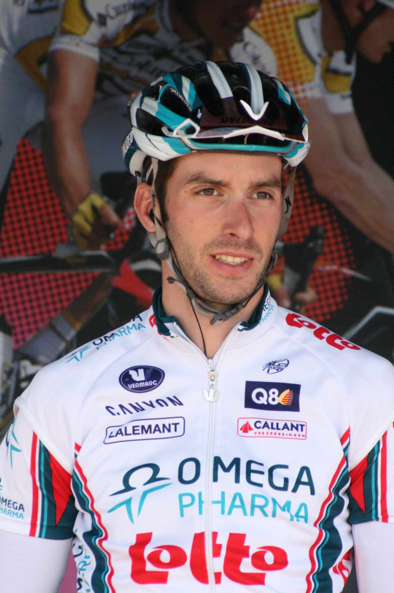 Kenny Dehaes, lors de la présentation des équipes des 4 jours de Dunkerque 2010